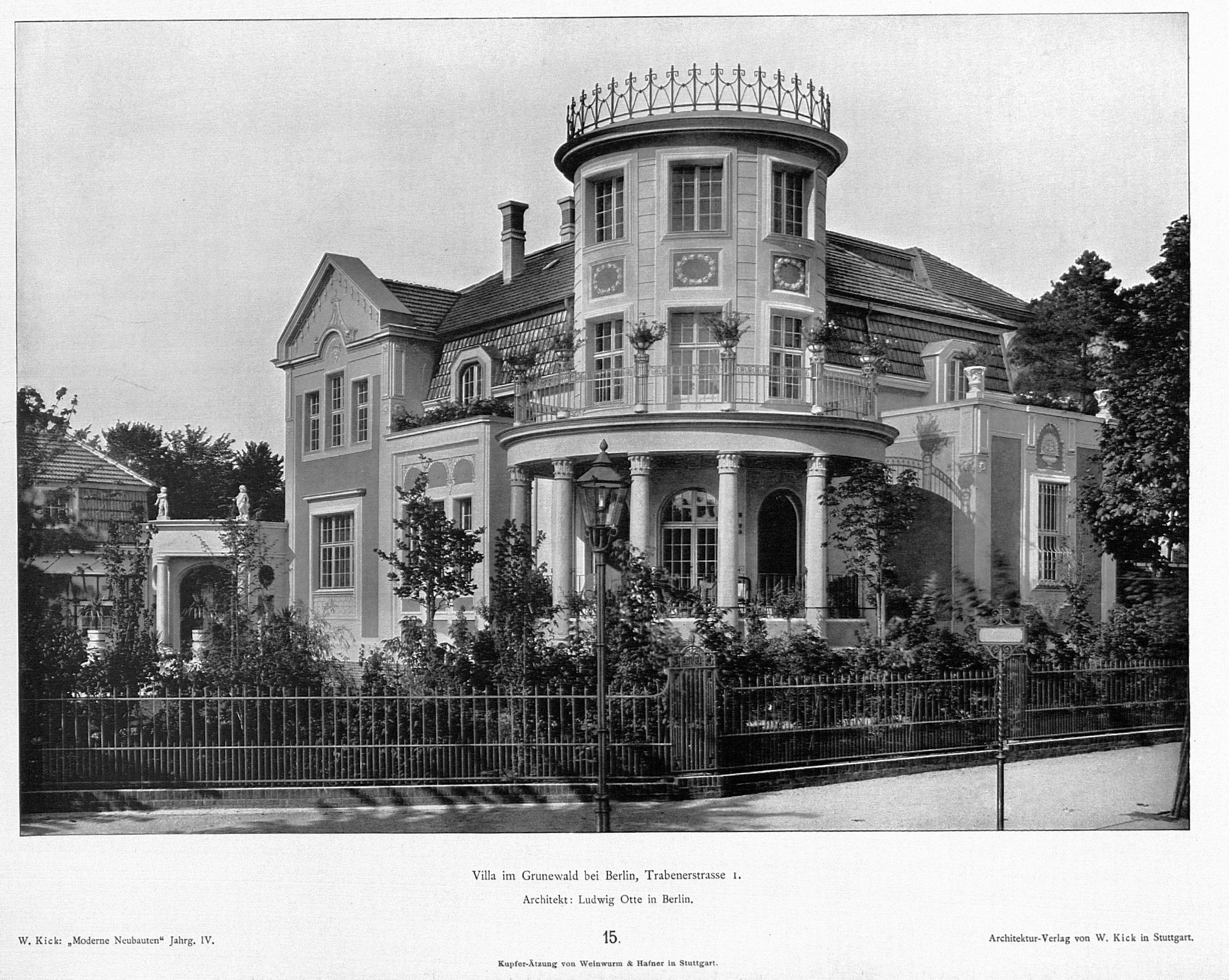 Villa Richard Stolzenberg in Berlin-Grunewald, Trabener Straße 1 / Am Bahnhof Grunewald; erbaut 1899-1900 nach Entwurf des Architekten Ludwig Otte; unter Denkmalschutz